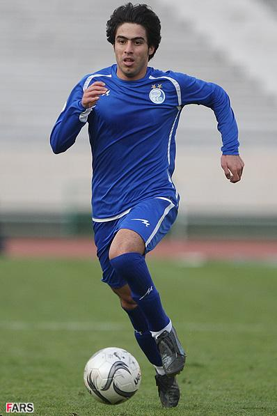 خسرور حیدری استقلالی زاده 2